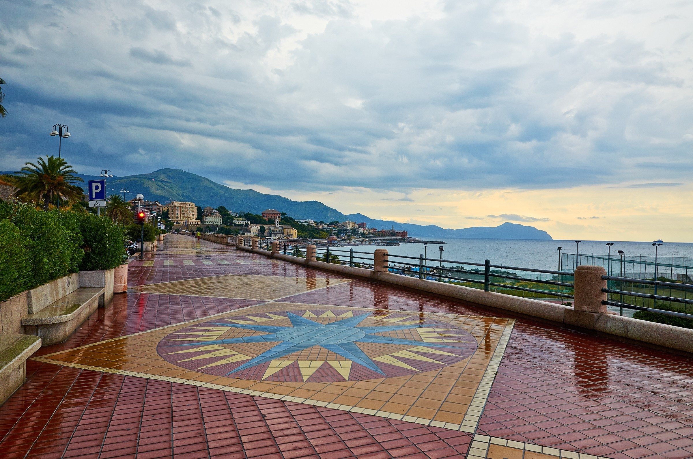 Lido di San Giuliano, da corso Italia